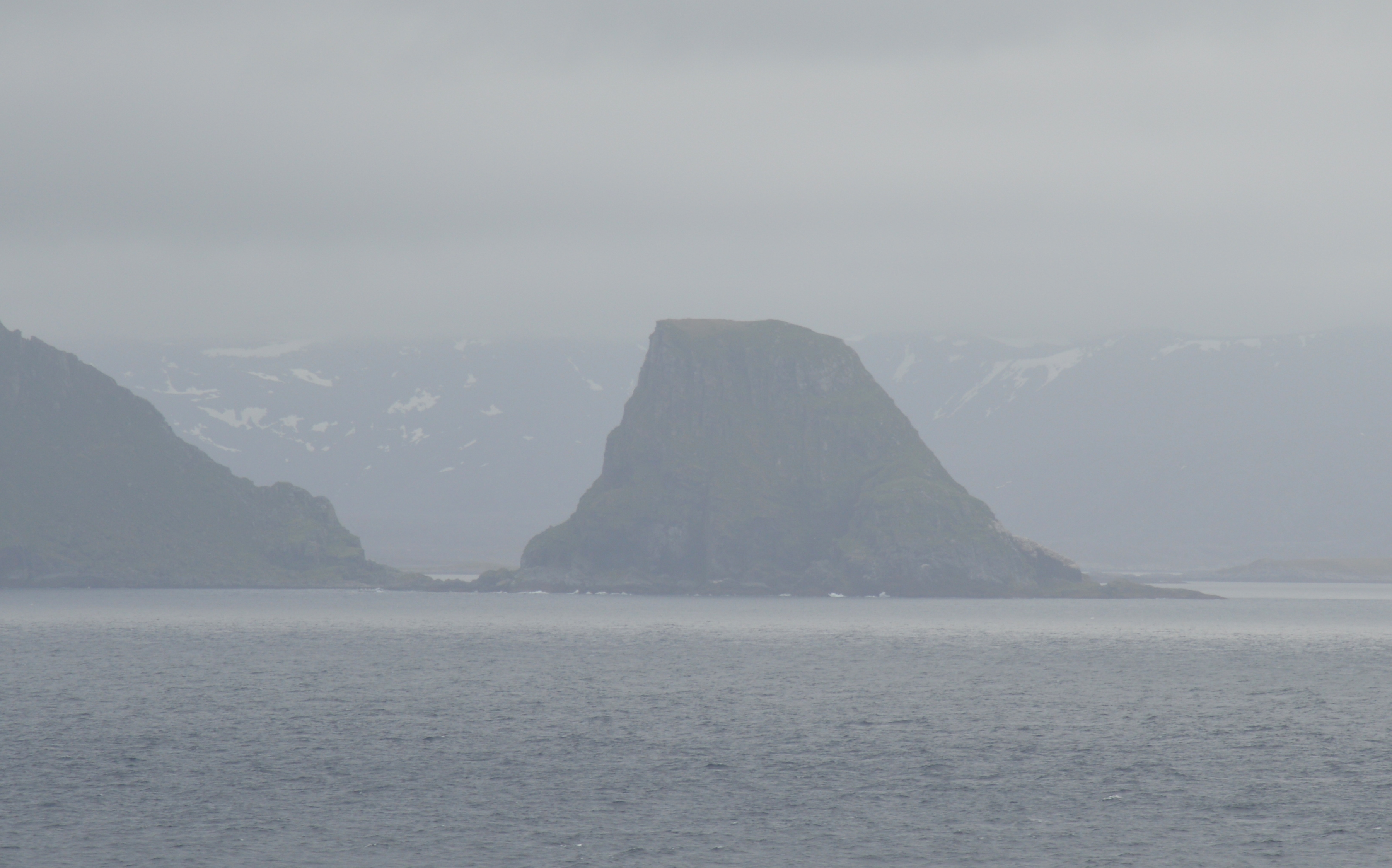 Stauren